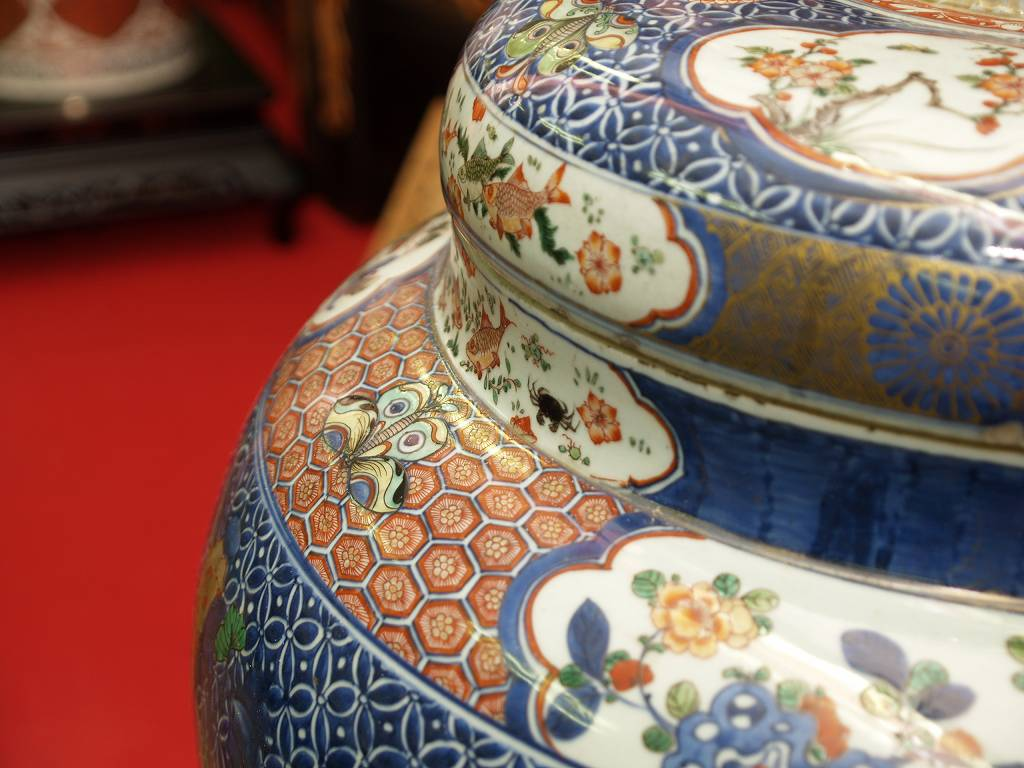 山名氏史料館「山名蔵」所蔵品